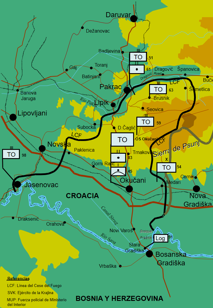 Organización de las TO en marzo de 1992